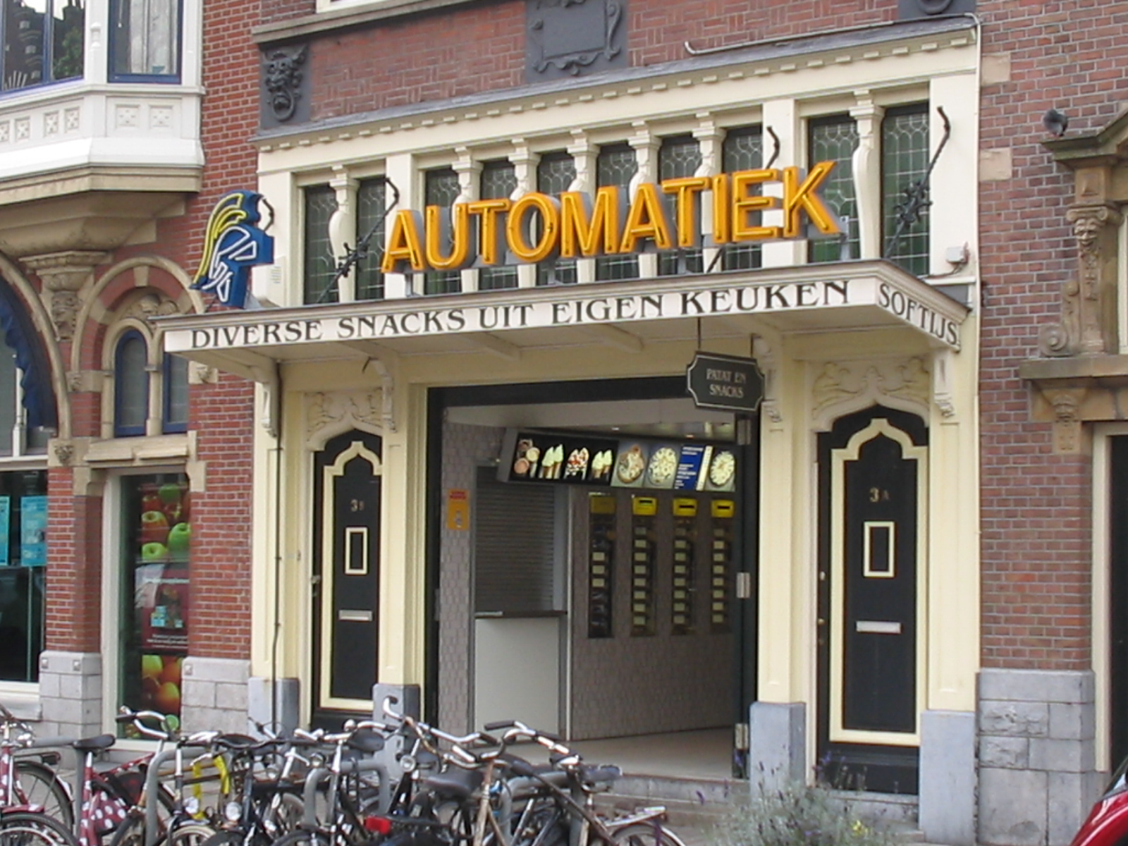 Automatiekhal in Delfshaven, Rotterdam.